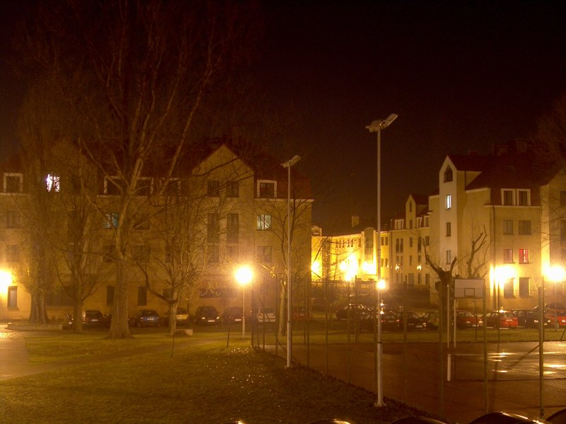 Akademiki Gaudium (po lewej) i Sapientia (po prawej) z Osiedla Studenckiego w Słubicach